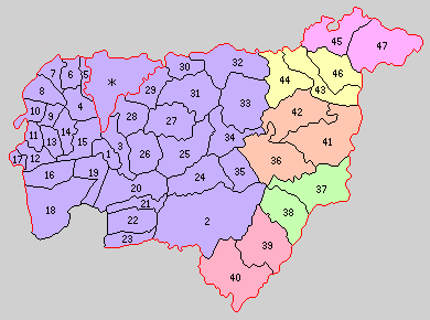 愛知県愛知郡の町村制時点の町村。